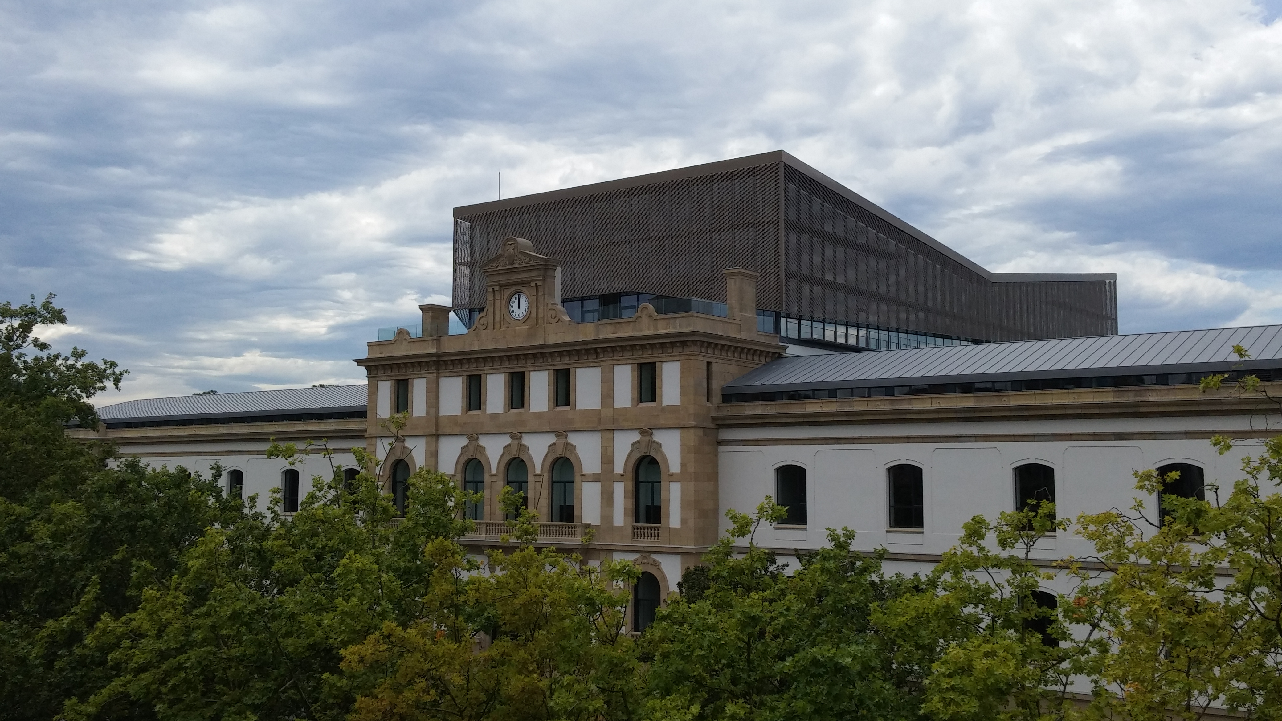 Tabakalera